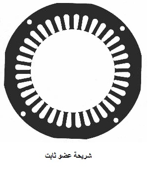 شريحة عضو ثابت